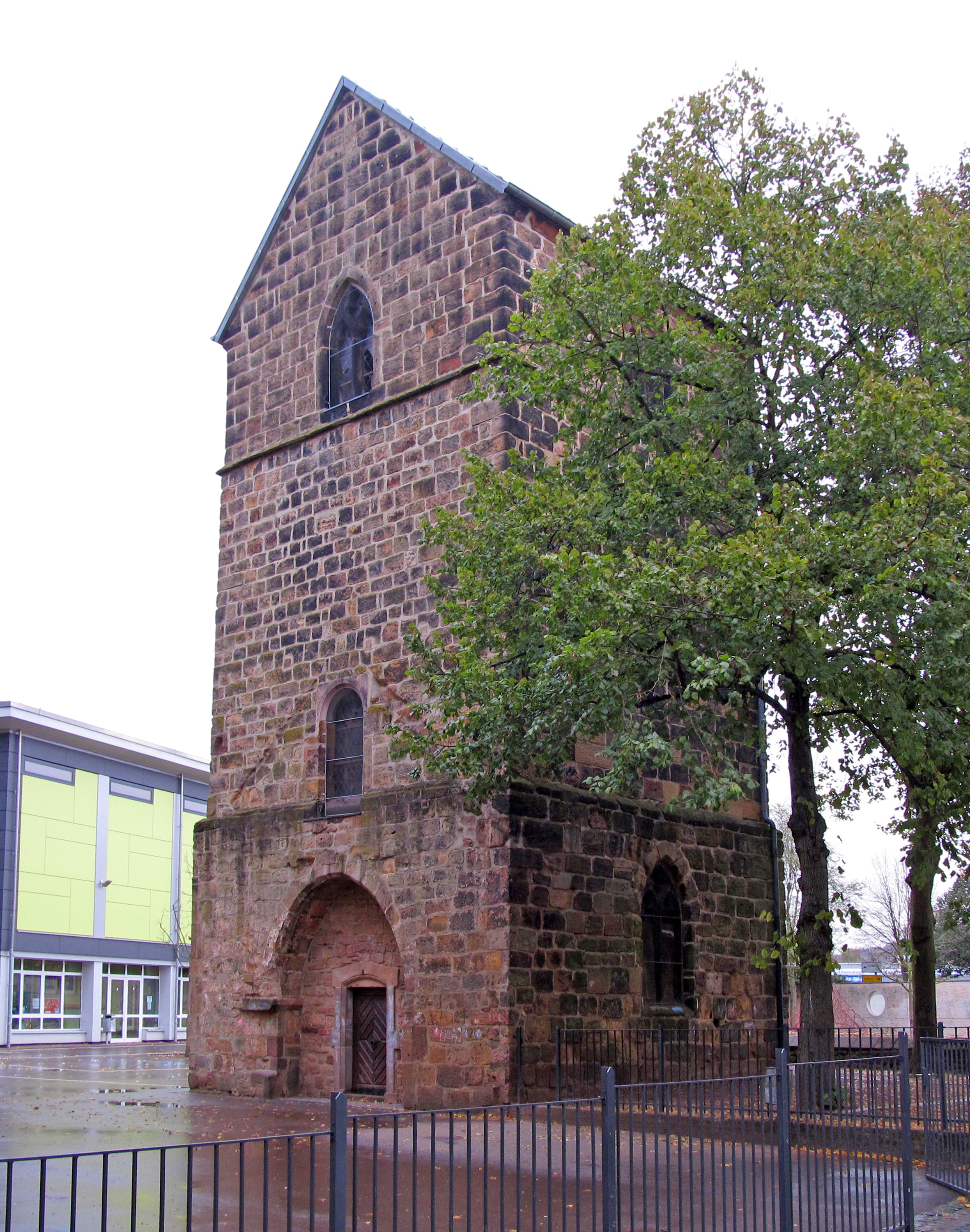 Alter Turm, Dudweiler, Stadt Saarbrücken, Saarland